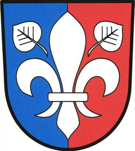 Pohled, okres Havlíčkův Brod, znak